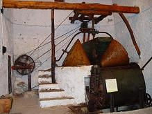 Museo del Aceite de Sot de Chera, en Valencia (España)